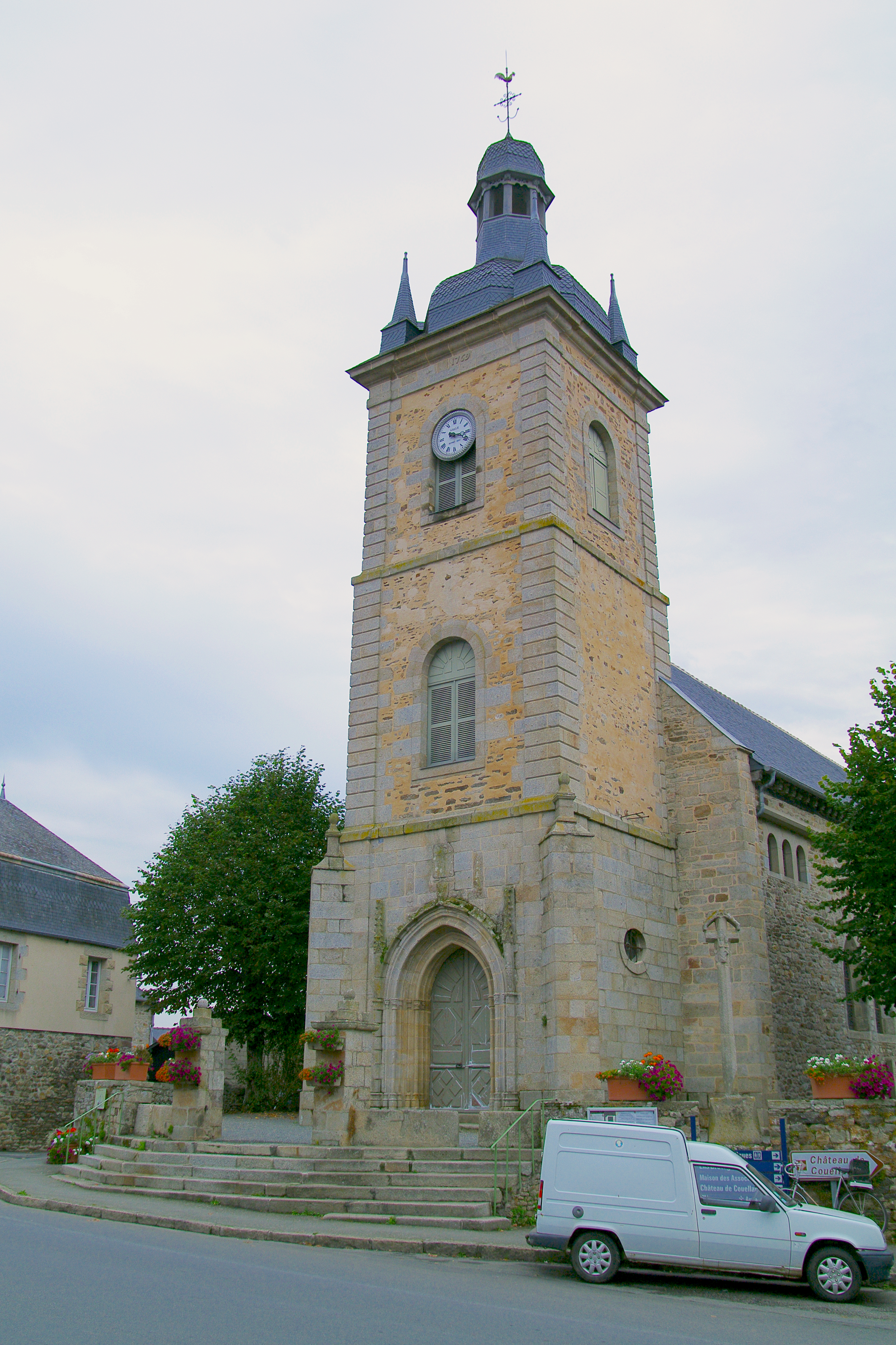 Église Saint-Pierre, (Inscription, 1925) .